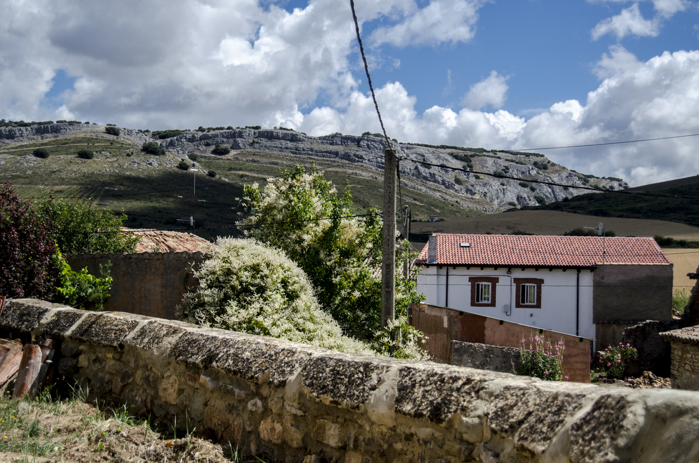 Peones de Amaya. Vista desde el muro que circunda el espacio del atrio. Peña Amaya al fondo.